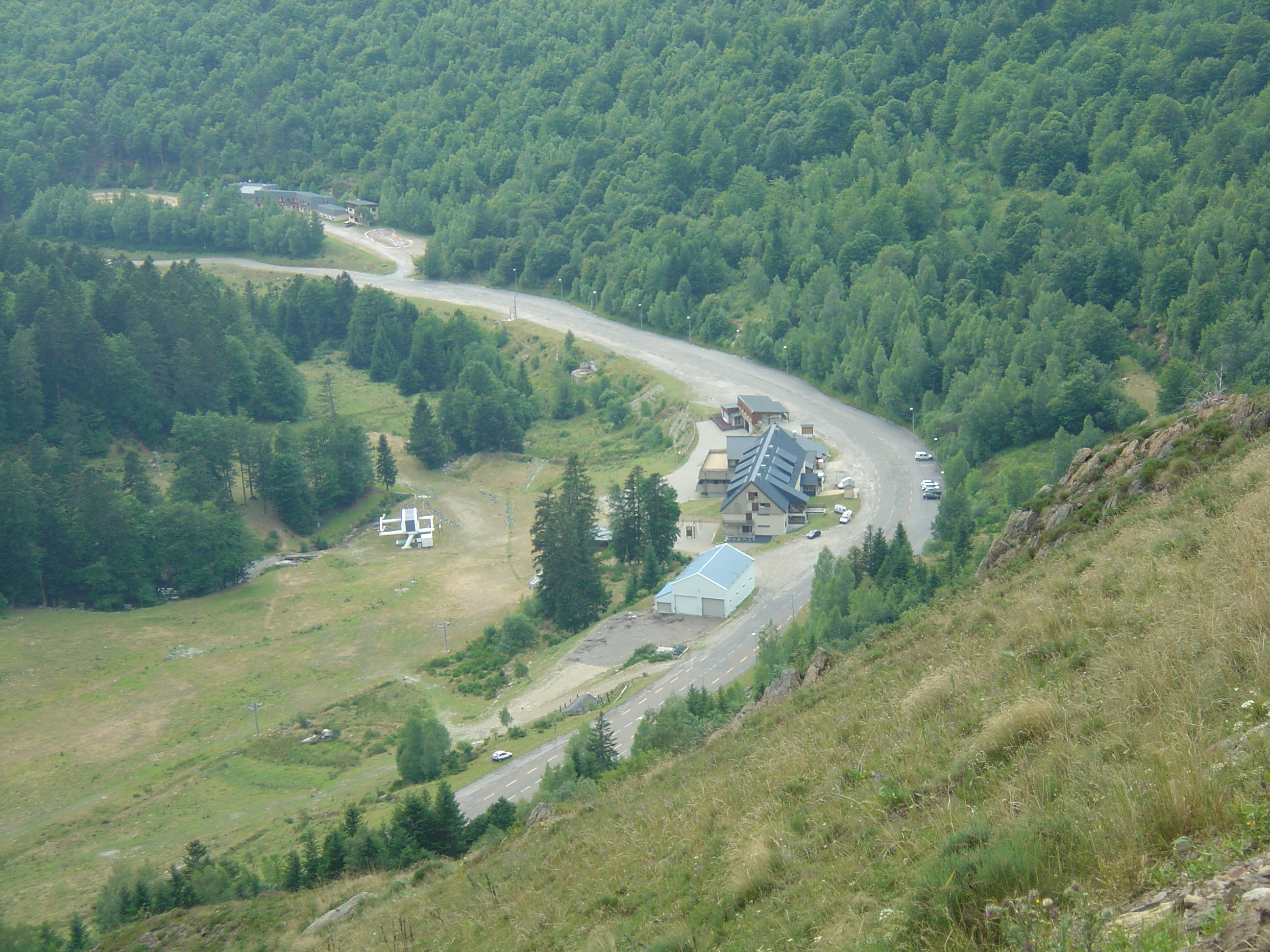 Petite station d'Ascou-Pailhères (Ariège, Midi-Pyrénées) sur la route du col de Pailhères.